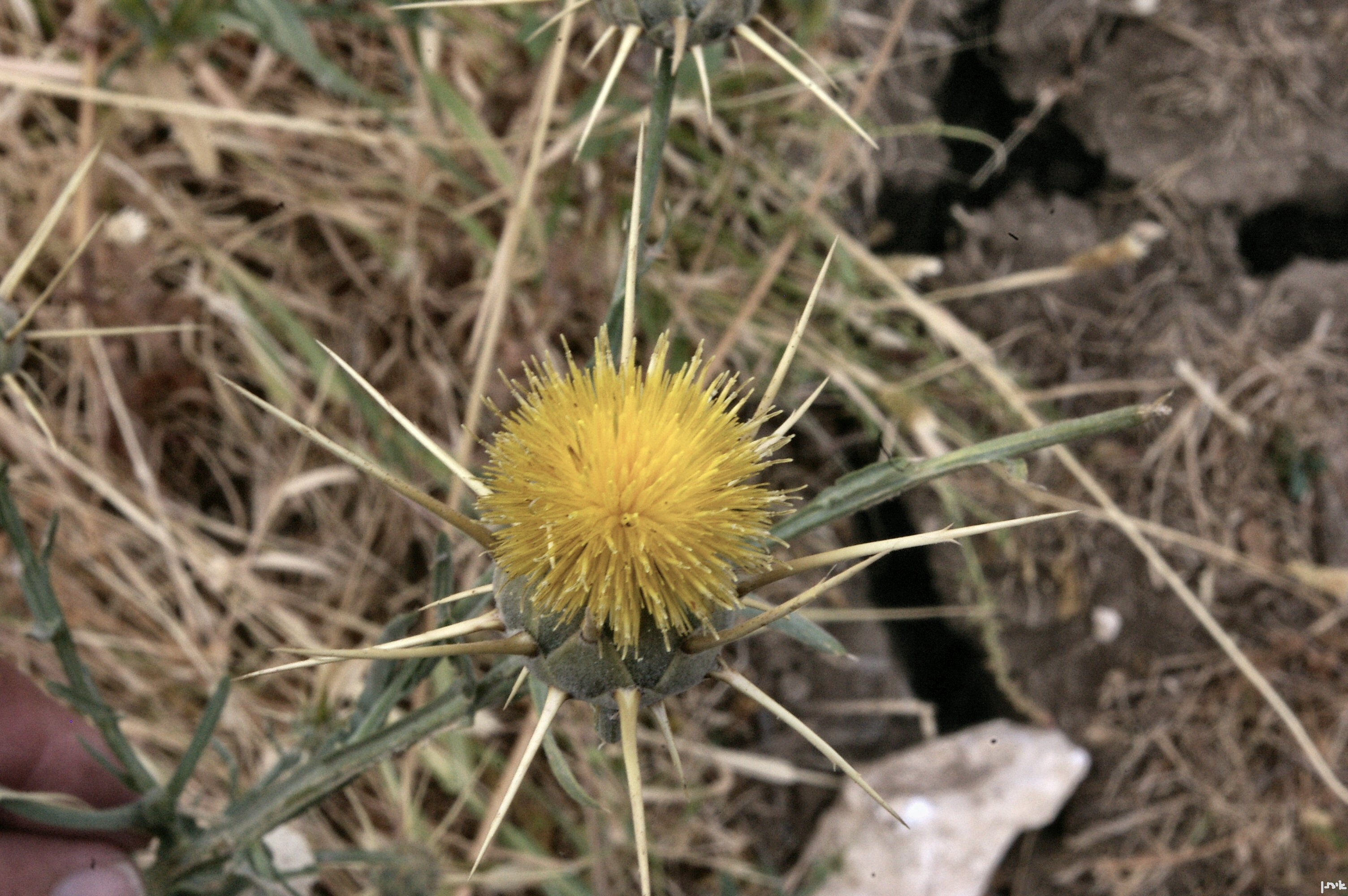 Centaurea verutum , Ayalon valley דרדר קִפֵּחַ - ליד לטרון